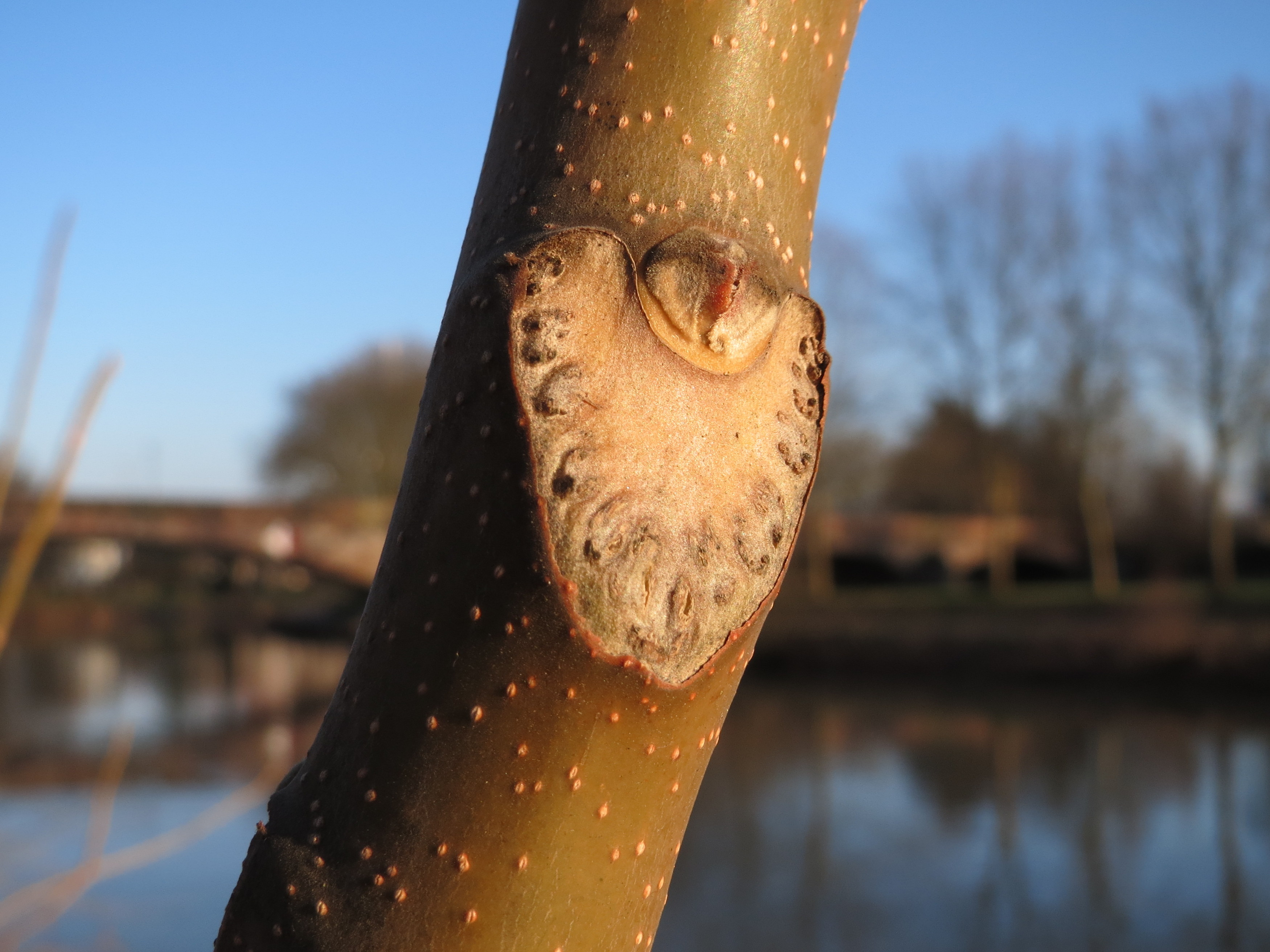 Blattnarbe an einem jungen Götterbaum (Ailanthus altissima) an der Saar in Saarbrücken